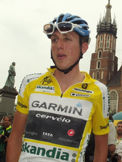 Zdjęcie zrobione podczas ostatniego etapu 68. Tour de Pologne w Krakowie.